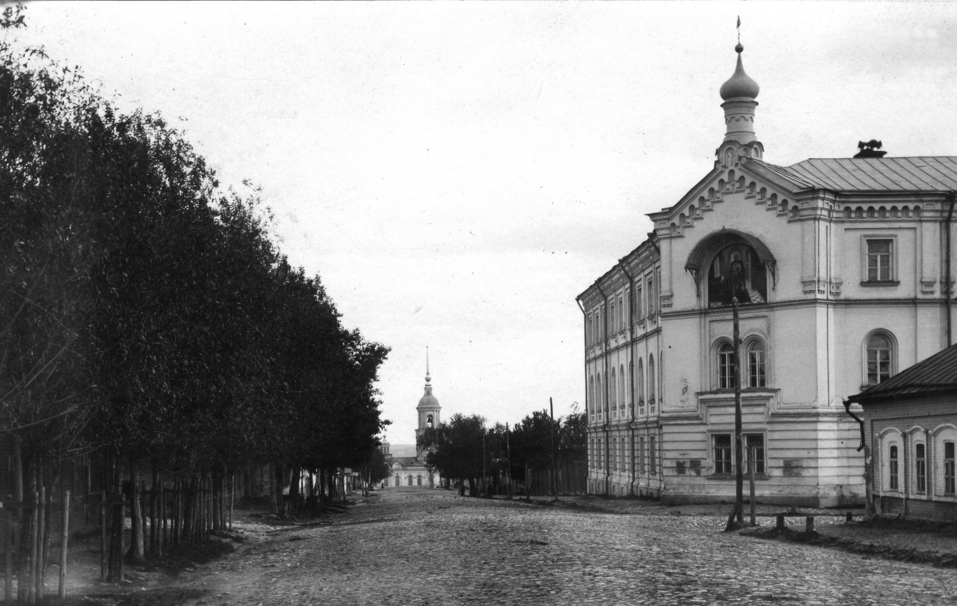 Реальное училище г.Скопина Рязанской области (сегодня - средняя общеобразовательная школа №1)